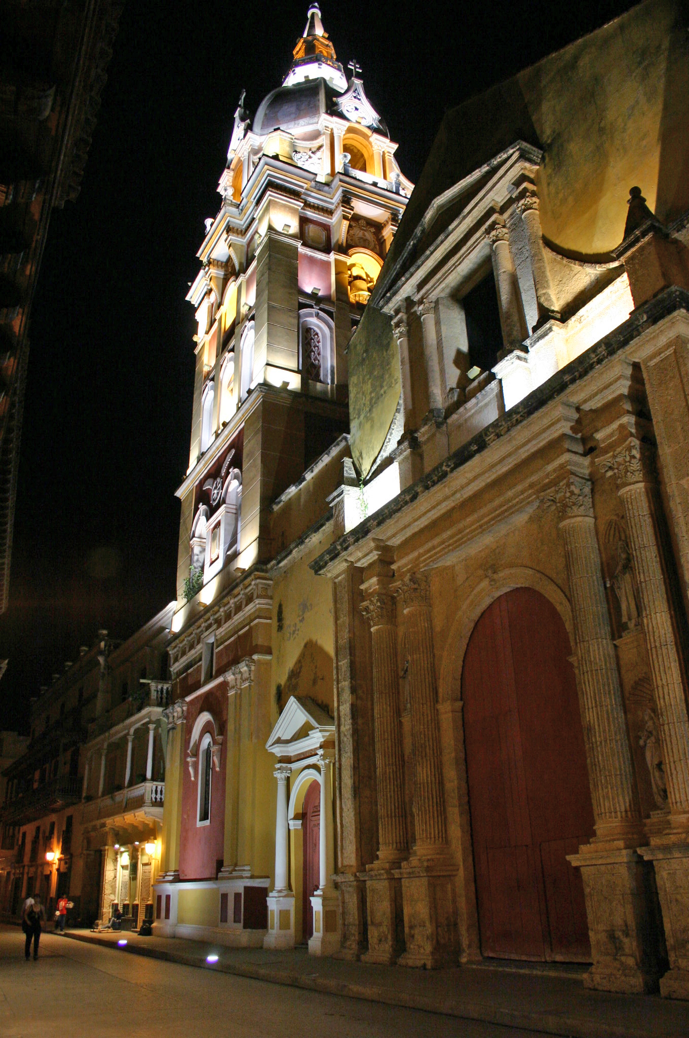 Foto nocturna de la fachada de la Catedral de de Cartagena de Indias, Colombia.